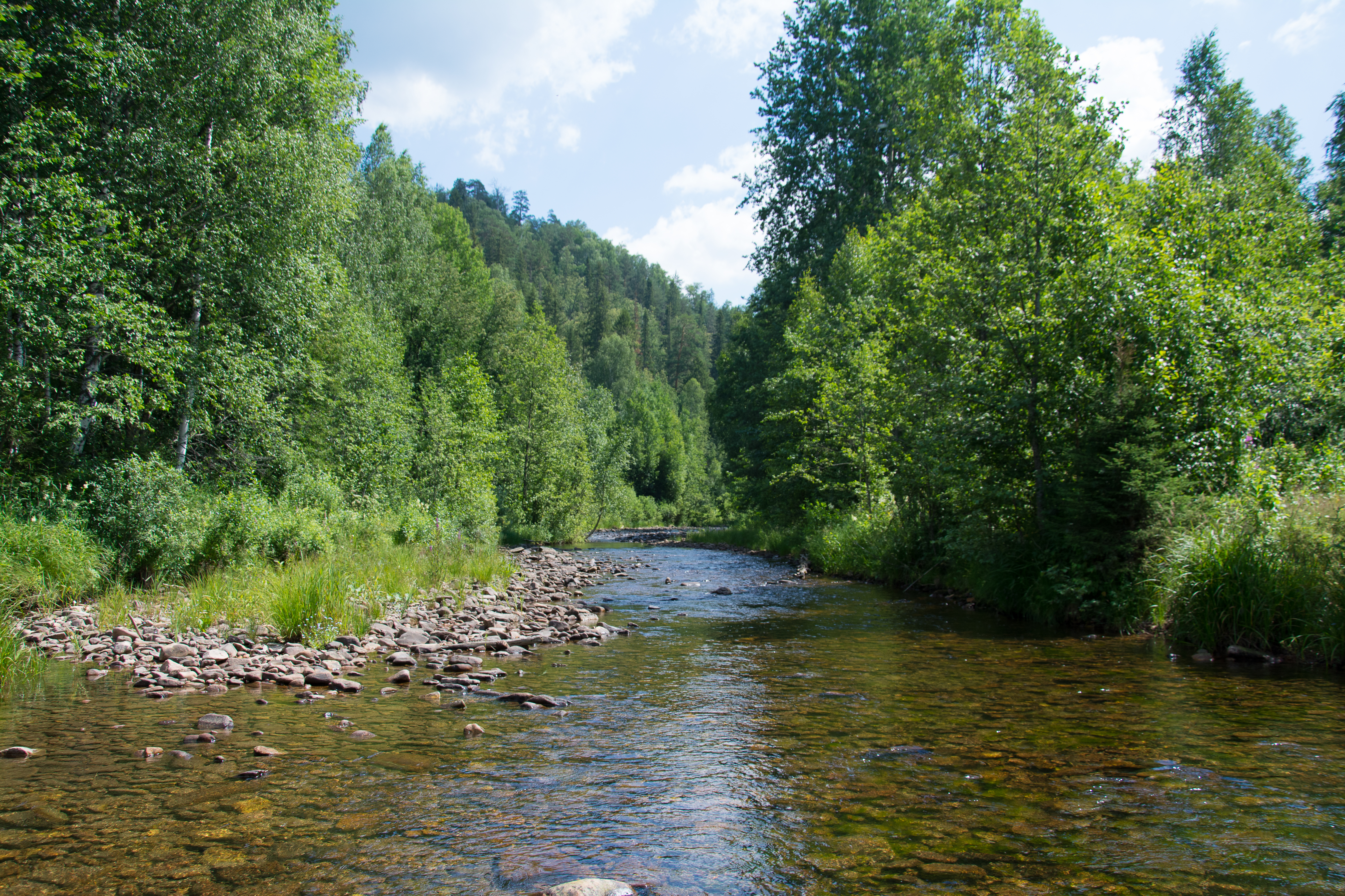 Пойма реки Малый Сурень, Зианчуринский район This image is related to the protected area of Russia number 0210139